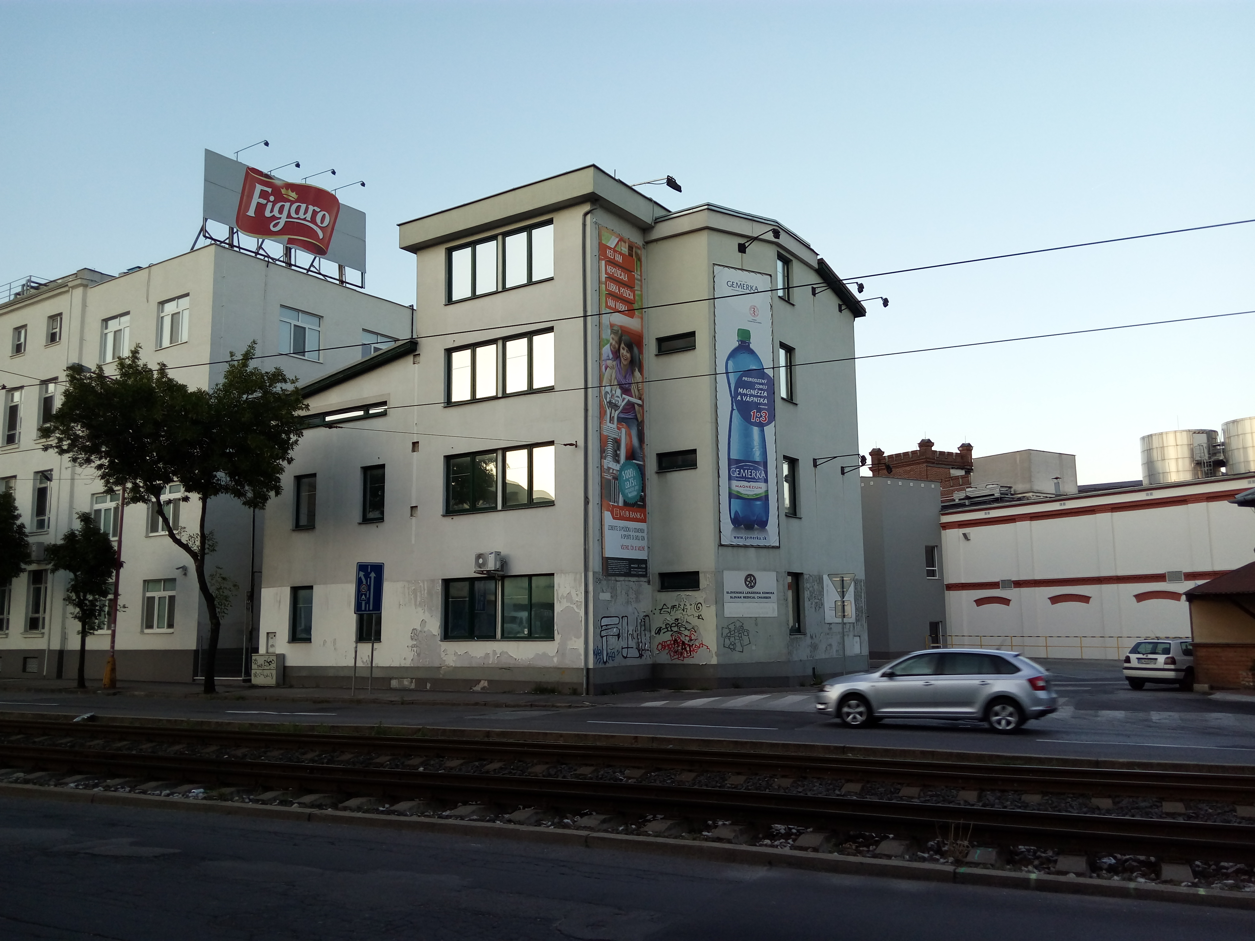 Račianska 42/A, Nové Mesto, Bratislava